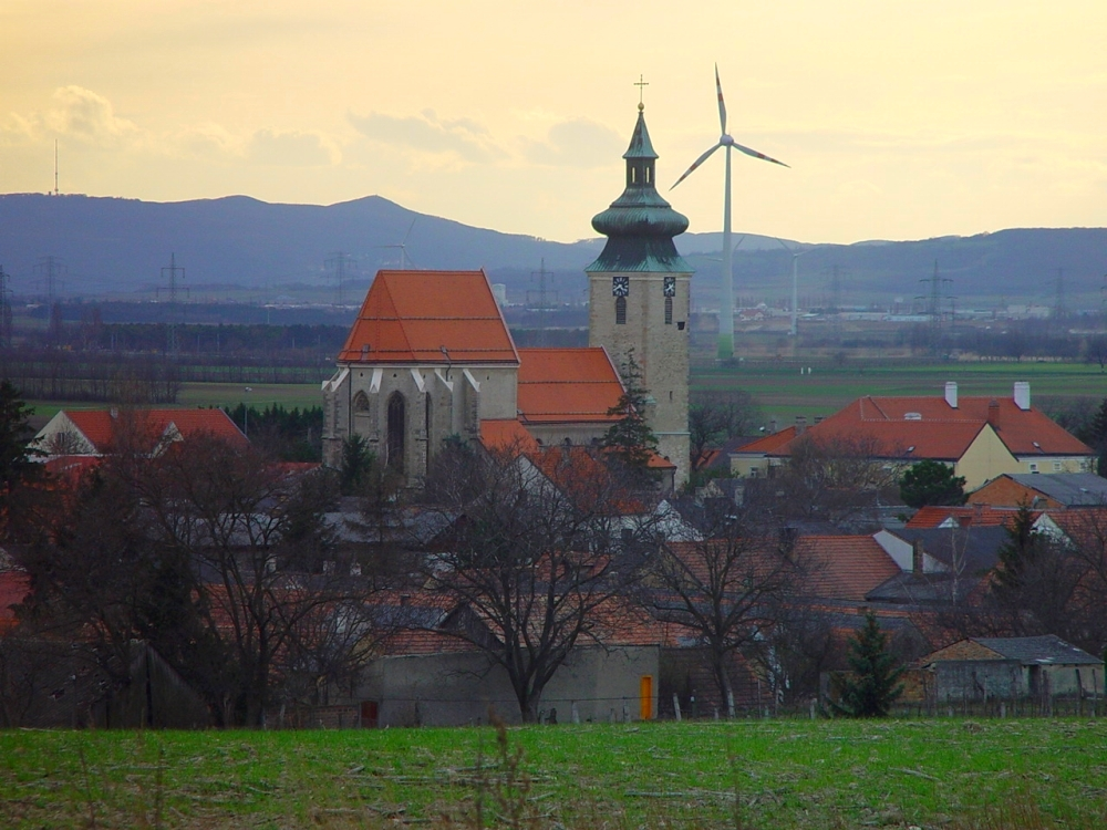 Ansicht der Pillichsdorfer Kirche von Norden